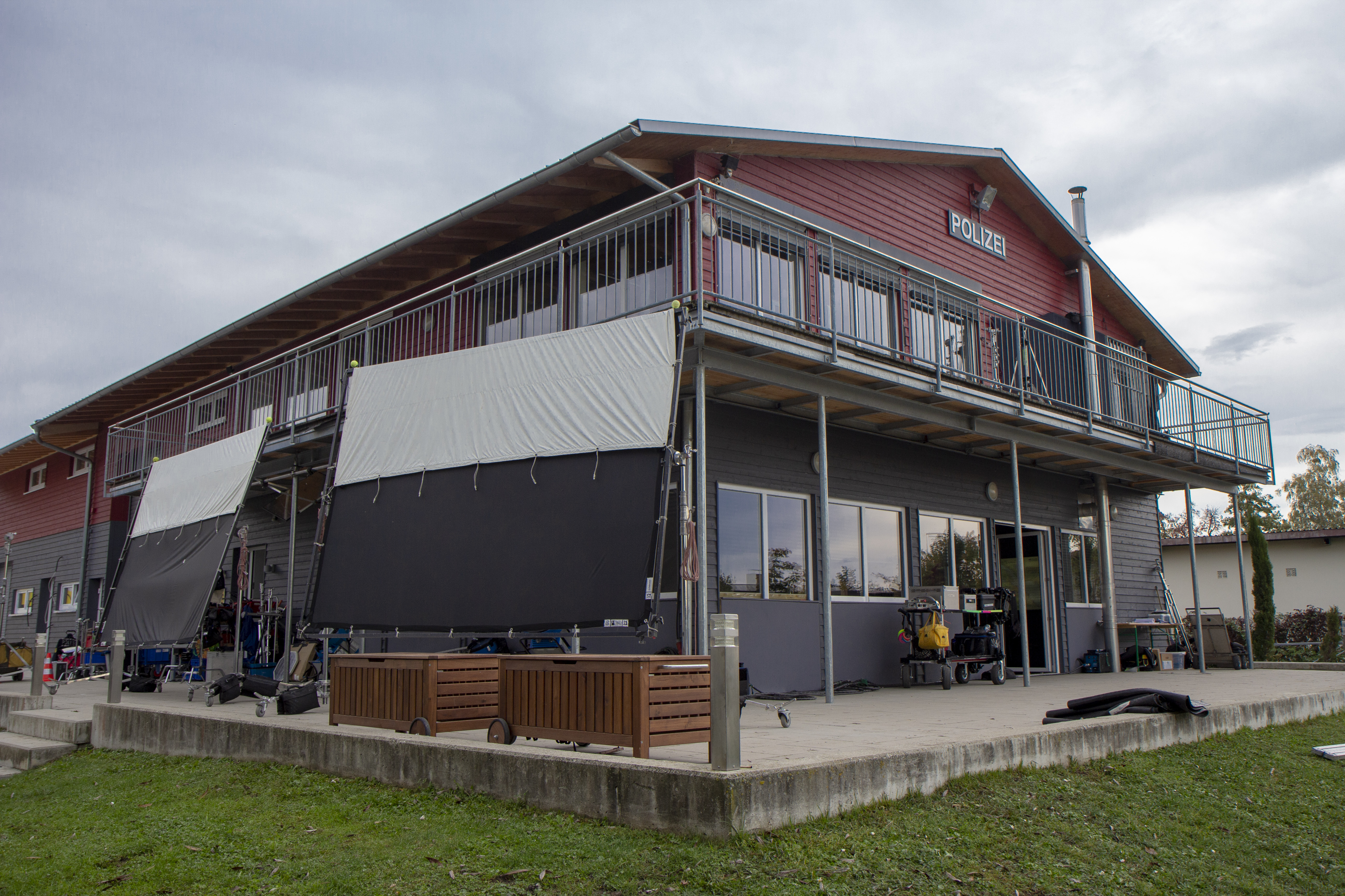 Am Set von WaPo Bodensee am 15. Oktober 2019 in Radolfzell am Bodensee.